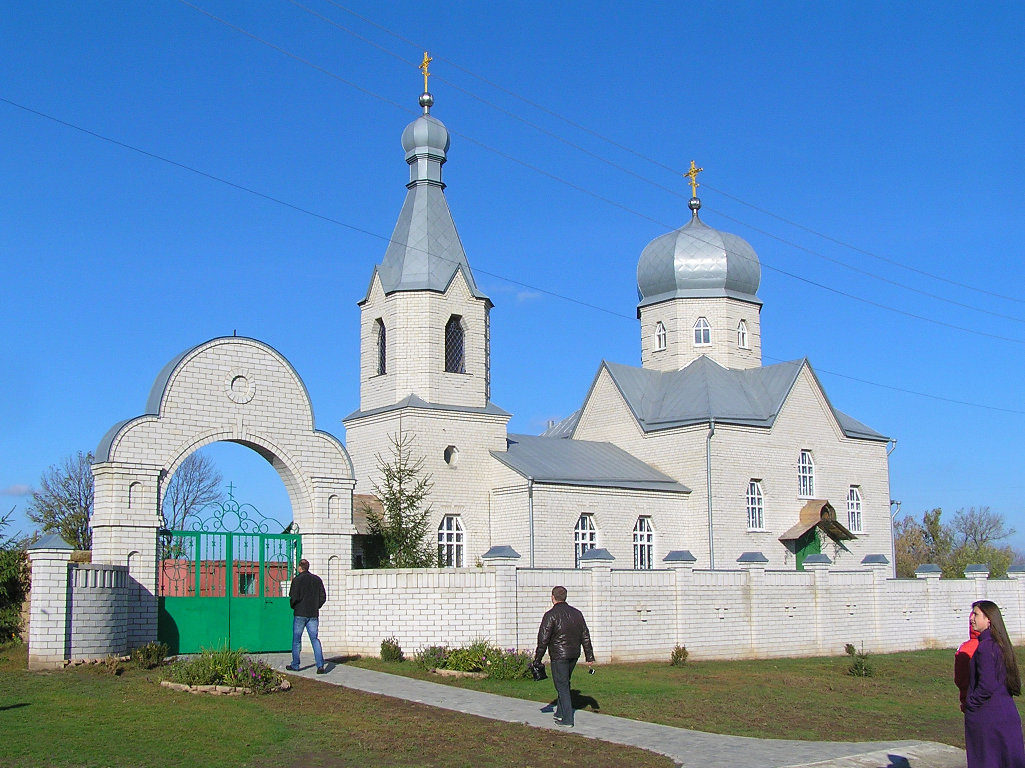 Нова Покровська церква (2001 р.), на місці дерев'яної церкви 19 ст. - пам'ятки архітектури місцевого значення, що згоріла у 1990-х рр., с. Писарівка, Золочівський район, Харківська обл.